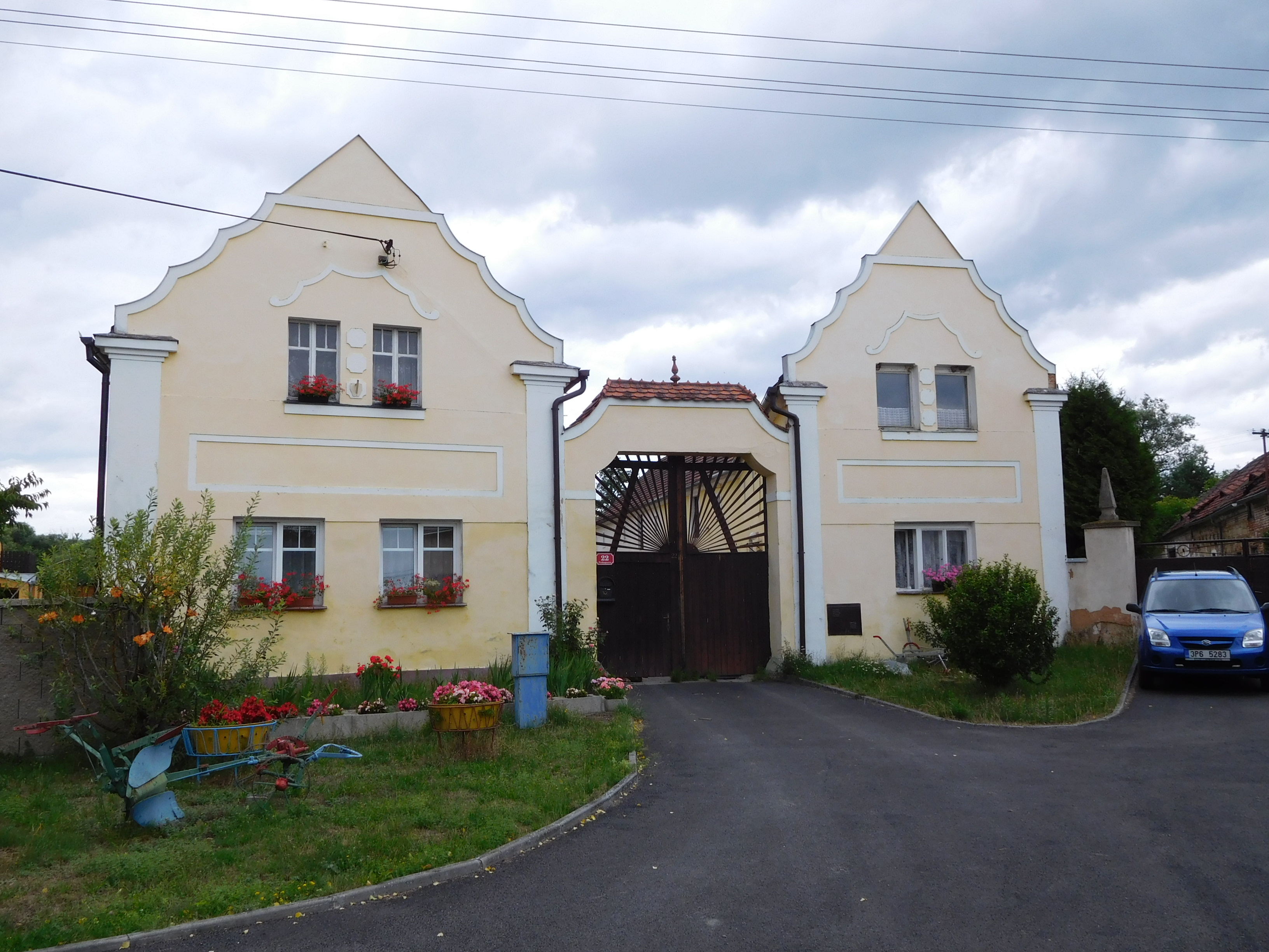 Bdeněves - usedlost č.p. 22